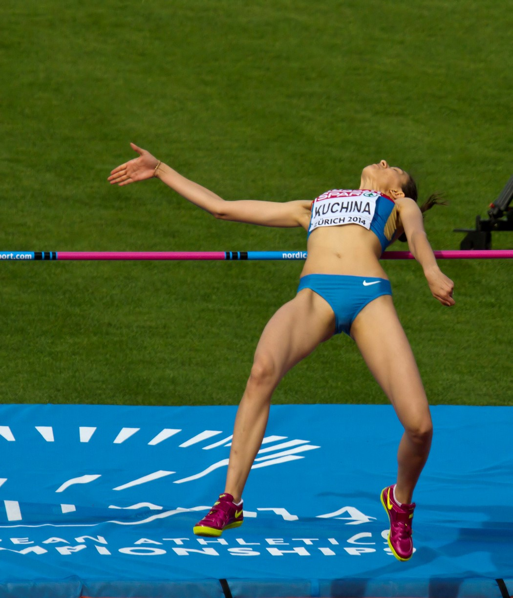 990759 hoog dames kuchina